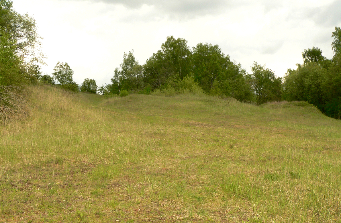 Landschaftsschutzgebiet und Geotop Dütberg, Magerasenfläche auf ehemaligem brit. Übungsgelände